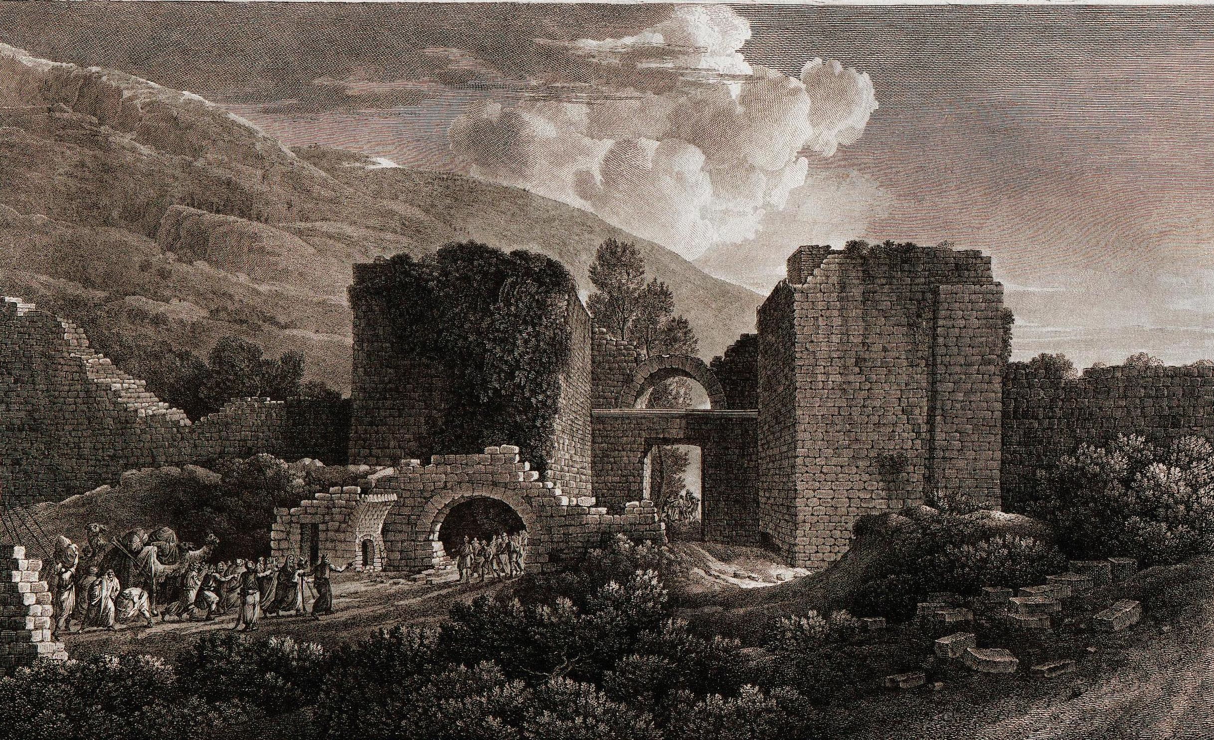 ANTIOCHE, appelée par les Arabes , ANTHAKYEH. Viu de la porte dite de Medine, ( BAB ÊL - MEDYNAH,) prise en dehors sur le chemin de Halep Cassas, Louis François Voyage pittoresque de la Syrie 1800 №5